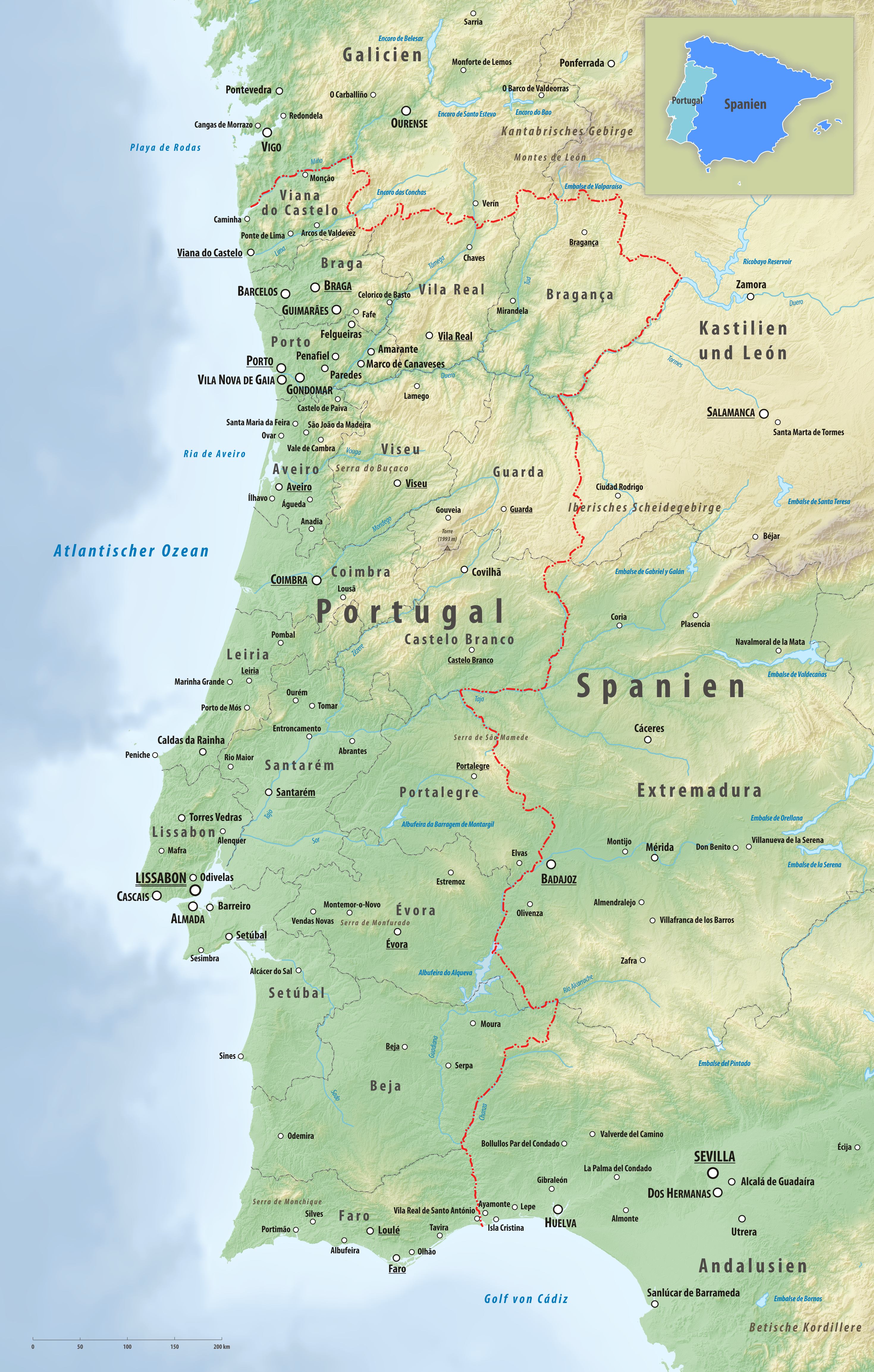 Reliefkarte des Grenzverlaufes zwischen Portugal und Spanien Topographischer Hintergrund: NASA Shuttle Radar Topography Mission (public domain). SRTM3 v.2.